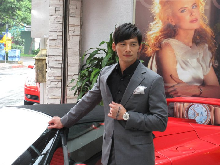 2011.06.01 瑞士雅典錶記者會@天母萬全鐘錶 溫昇豪代言